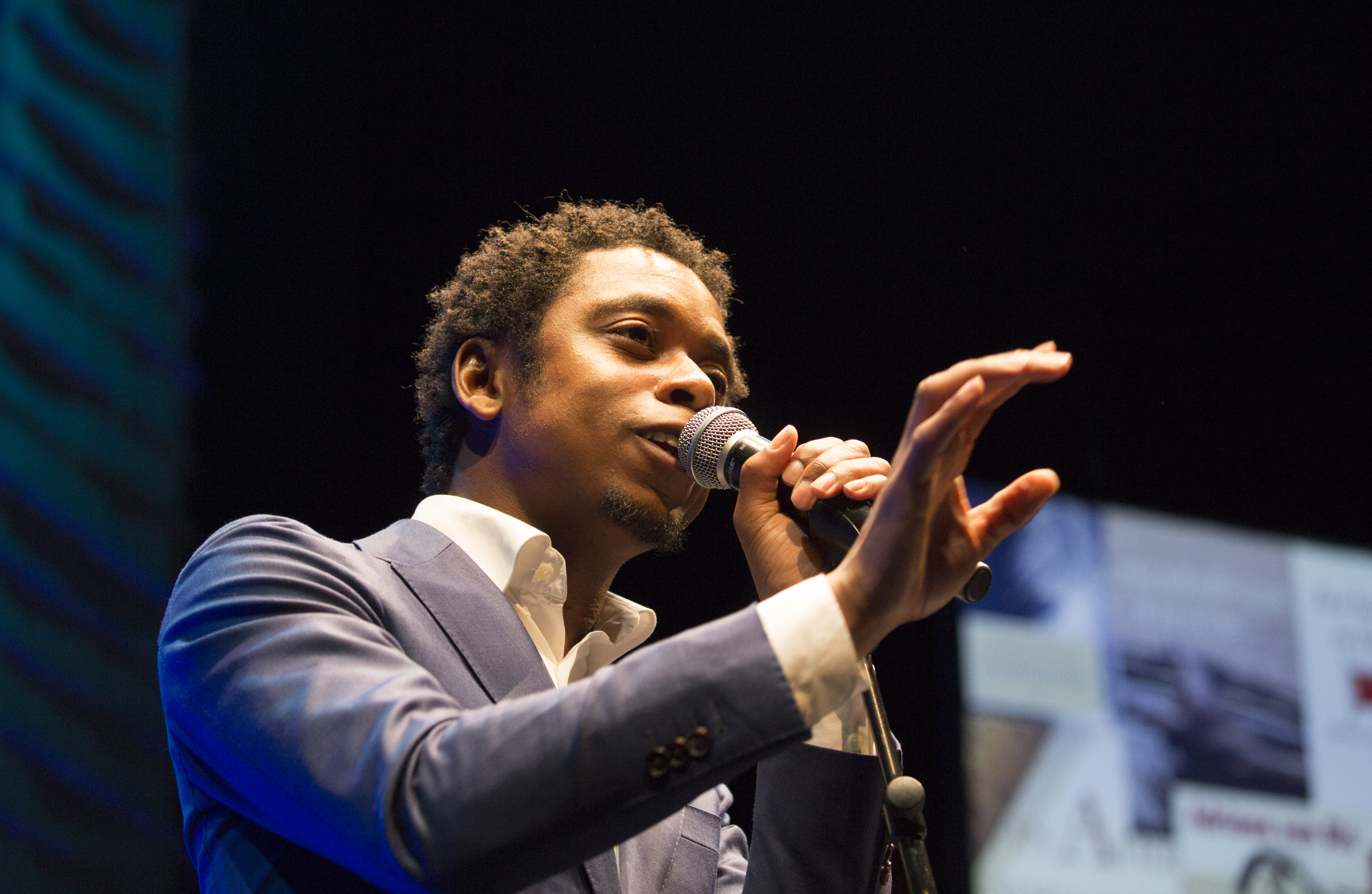 Typhoon - Schrijversfeest - Winternachten 2016 Schrijversfeest Theater aan het Spui, Den Haag, Nederland